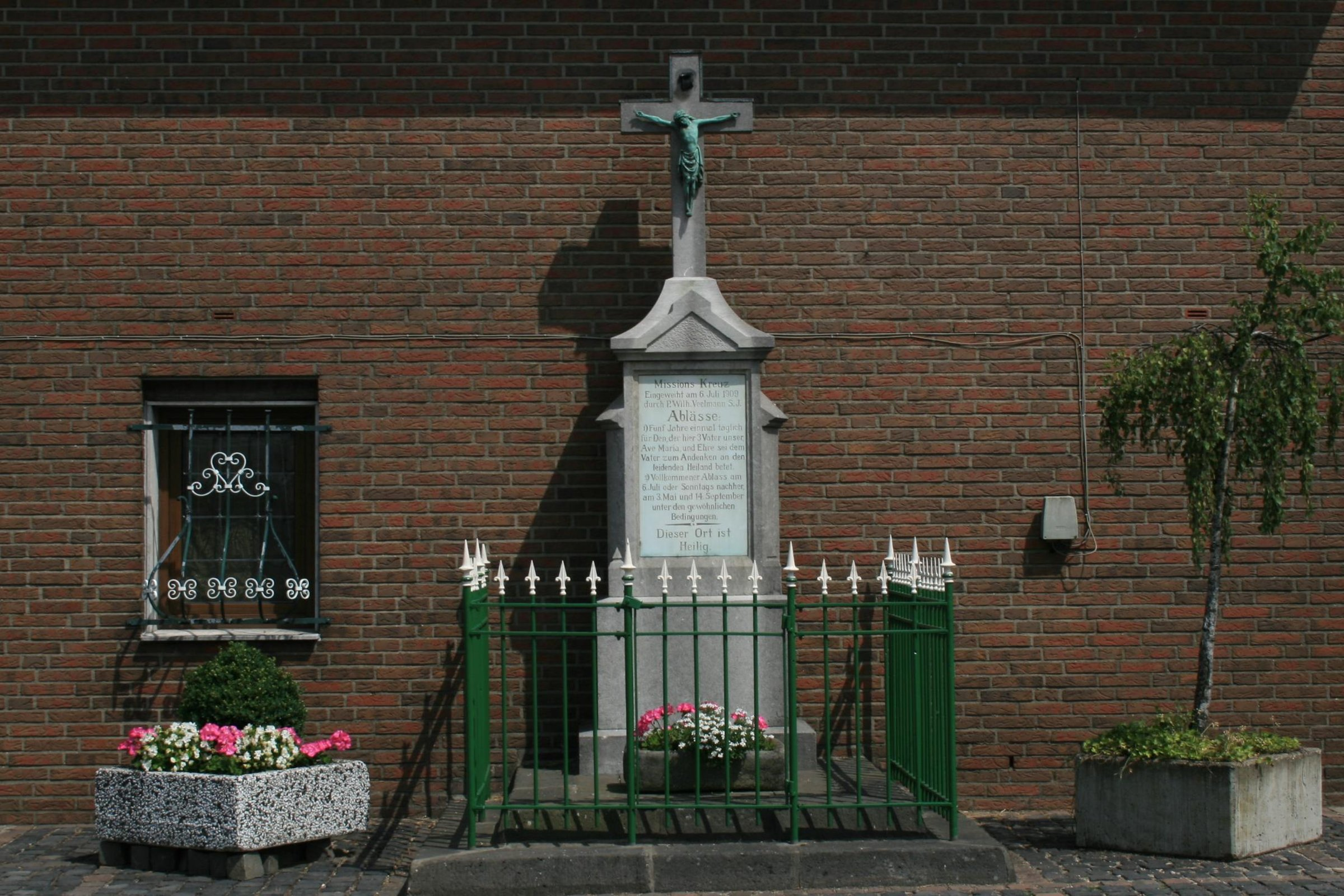 Wegekreuz Kothausener-Gladbacher Straße Mönchengladbach / Kapelle St. Antonius und St. Rochus in Kothausen